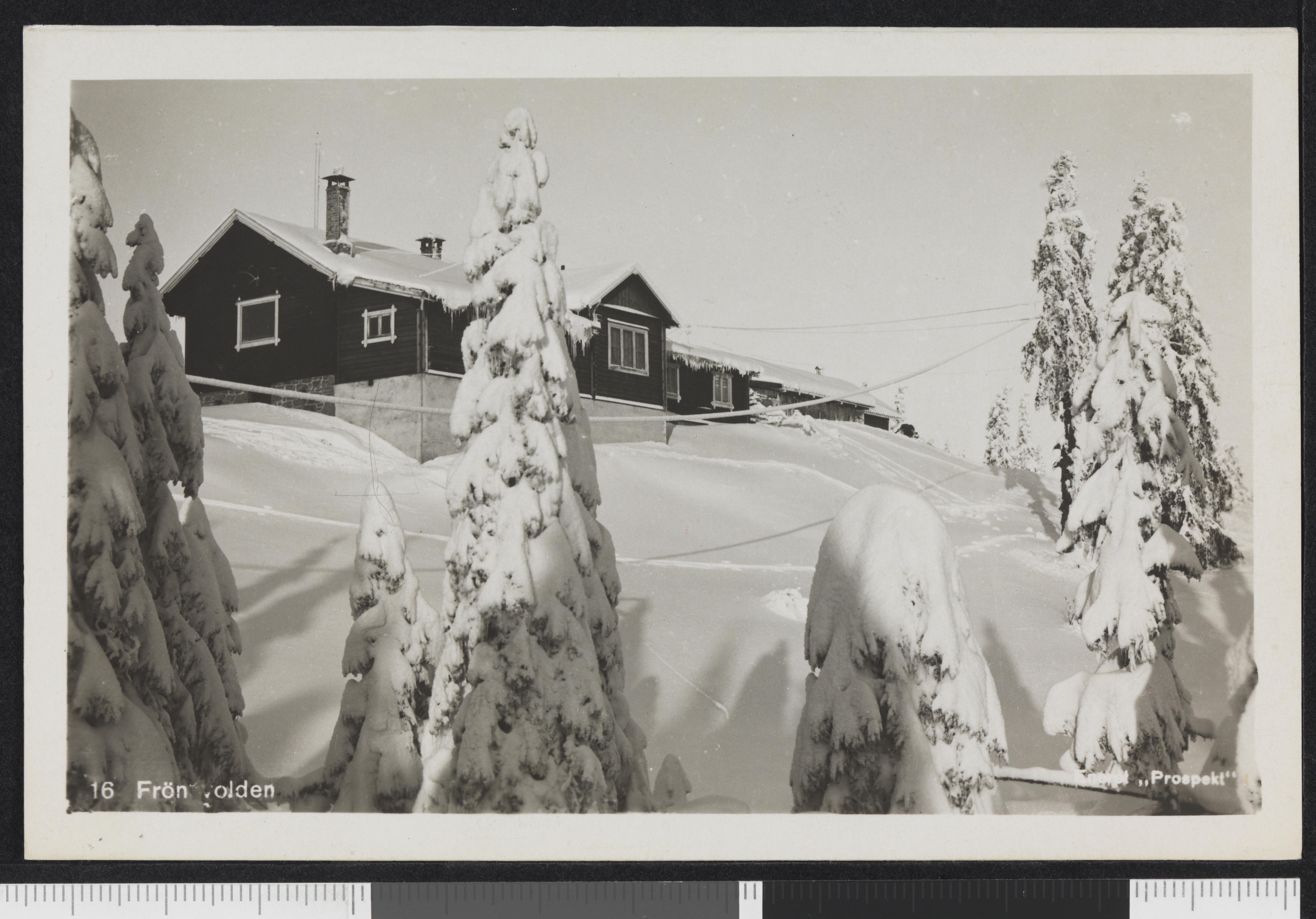 Bildet er hentet fra Nasjonalbibliotekets bildesamling Frønsvollen,Nordmarka, Oslo, Oslo